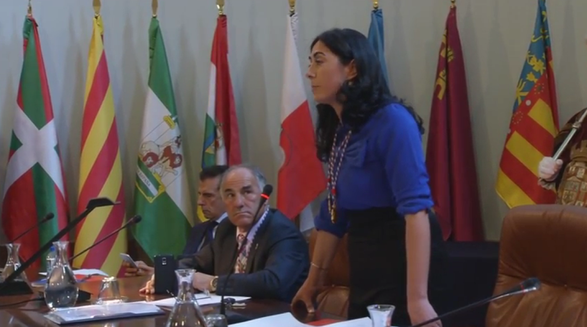 Elena Candia, alcaldesa de Mondoñedo, na investidura como presidenta da Deputación Provincial de Lugo.